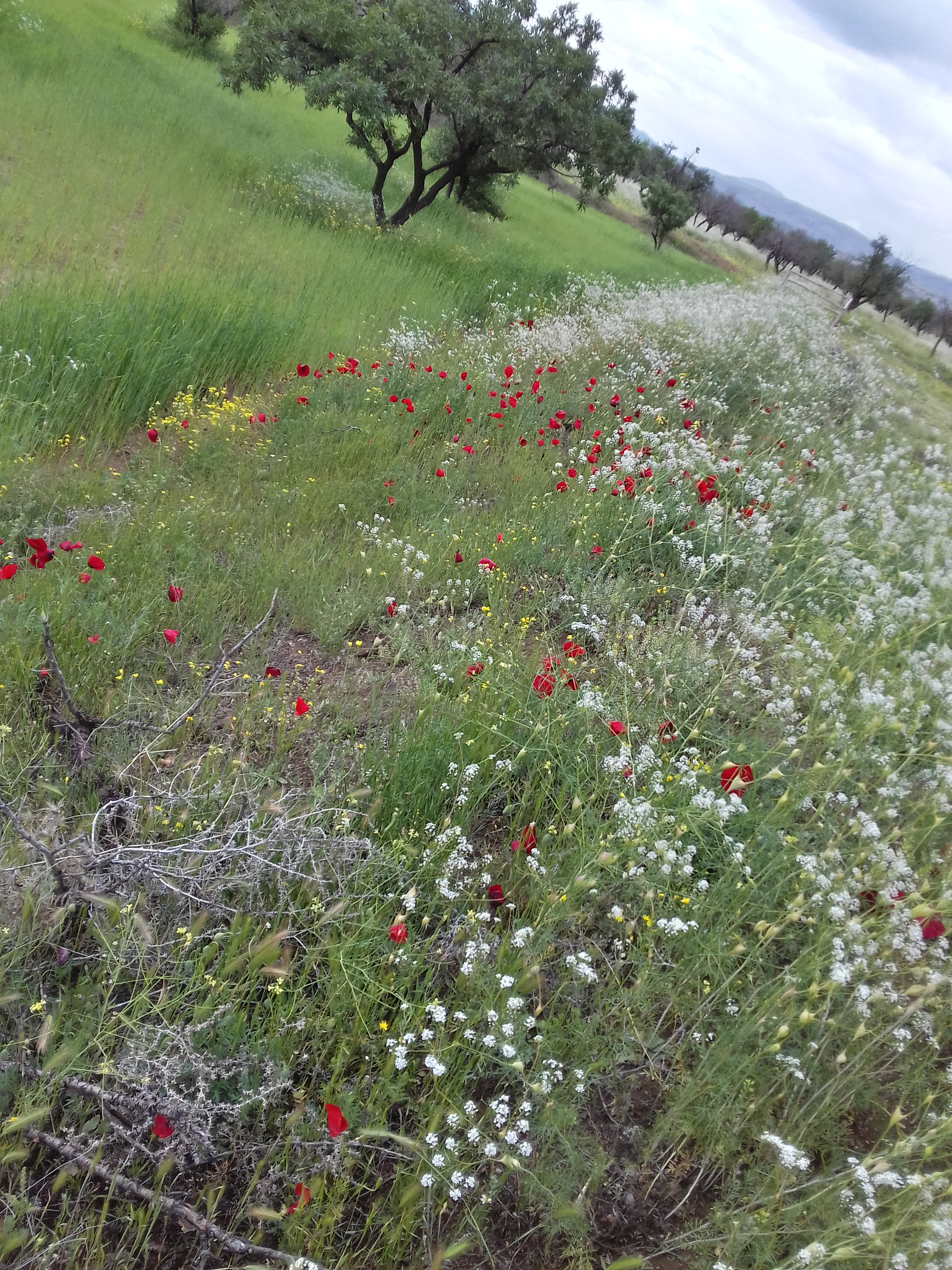 تصاویری از حومه روستای نجف آباد ارومیه، شامل طبیعت بکر و ورودی و... را مشاهده میکنید